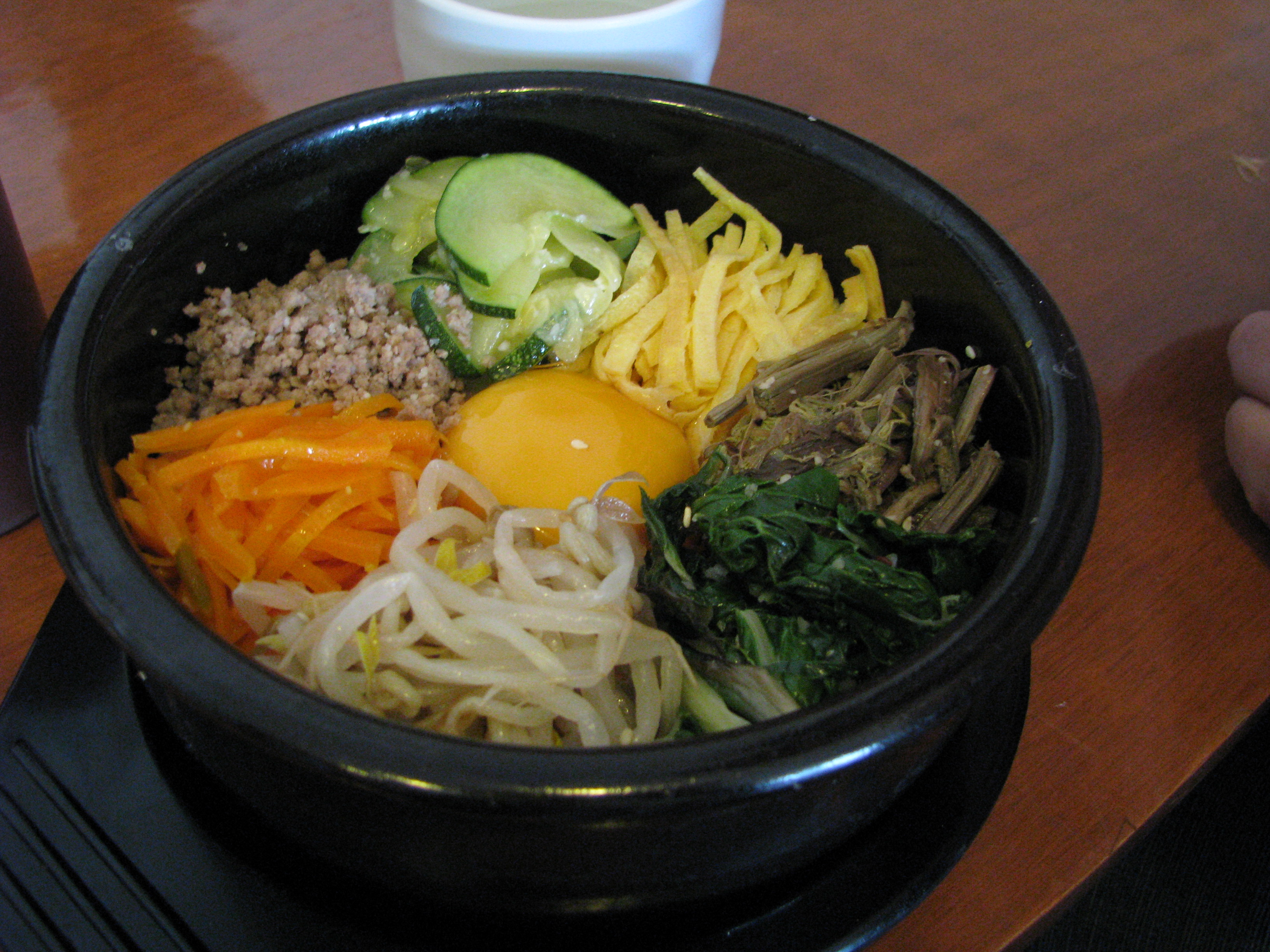 Bibimbap in Korean cuisine